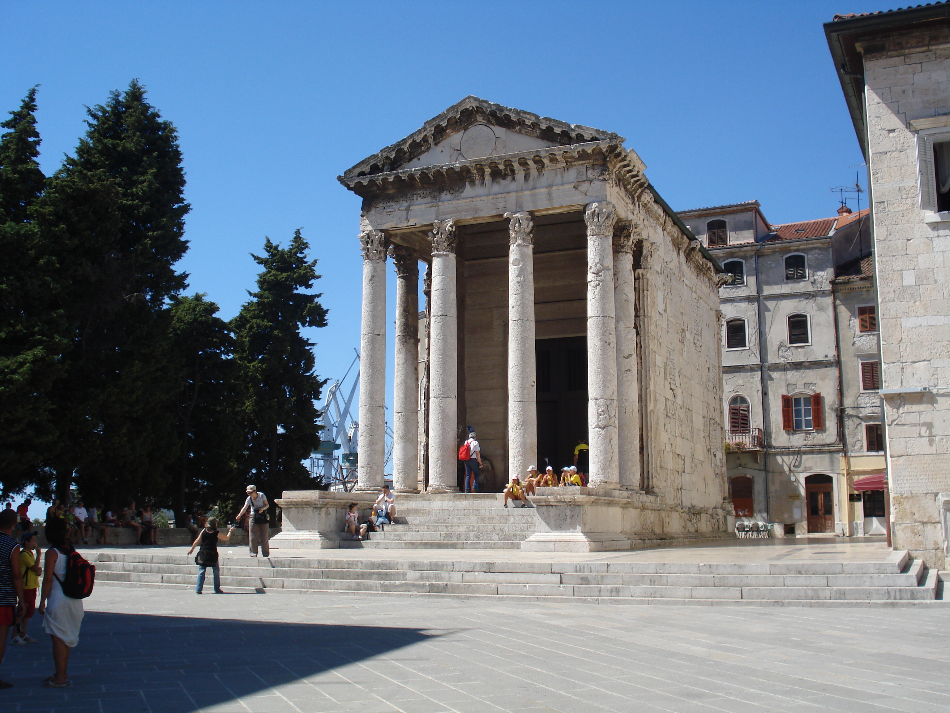 Augustus temploma, Póla, Horvátország